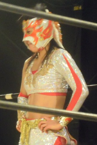 Ray 2011年2月26日アイスリボン 投稿者撮影